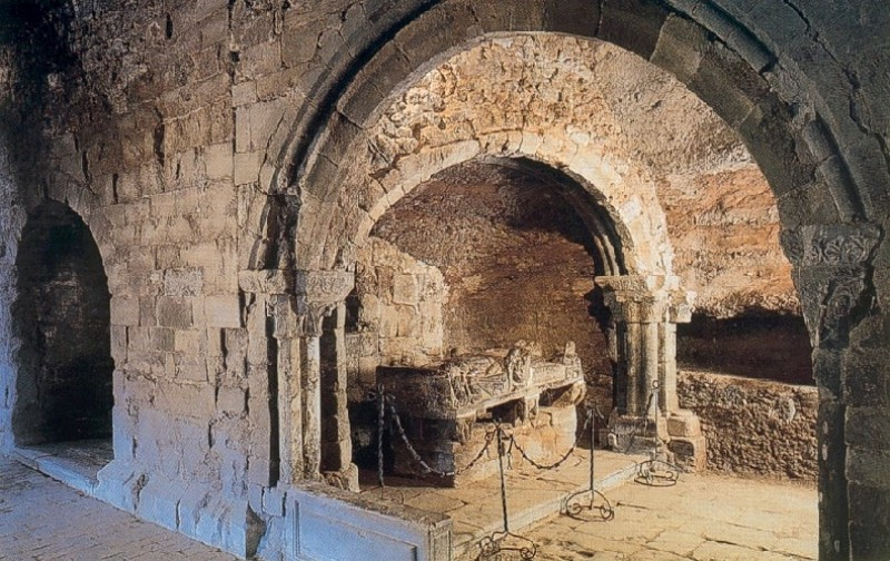 Cenotafio de San Millán en el Monasterio de San Millán de Suso.